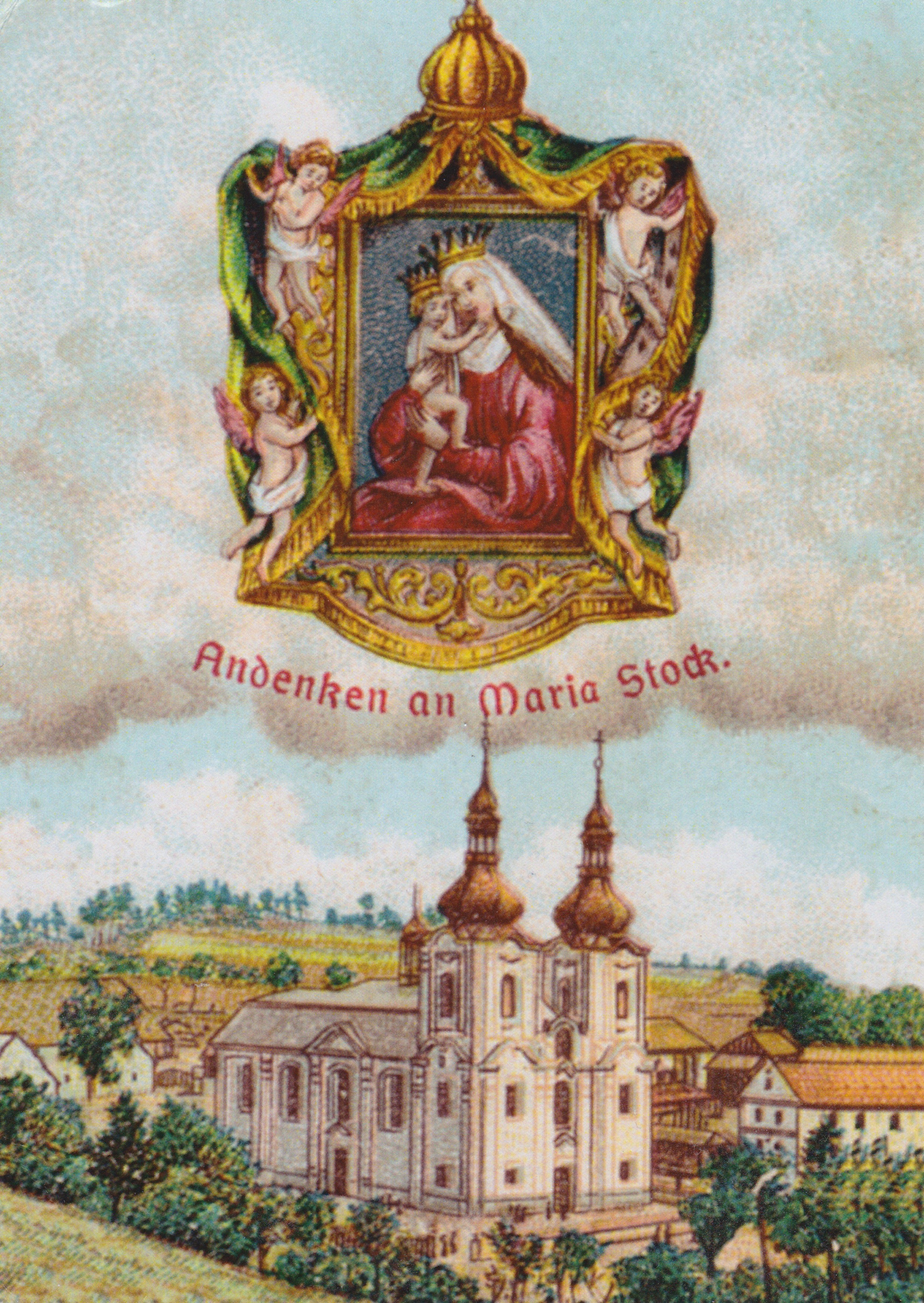 Kopie Dobové pohlednice, kolem roku 1930